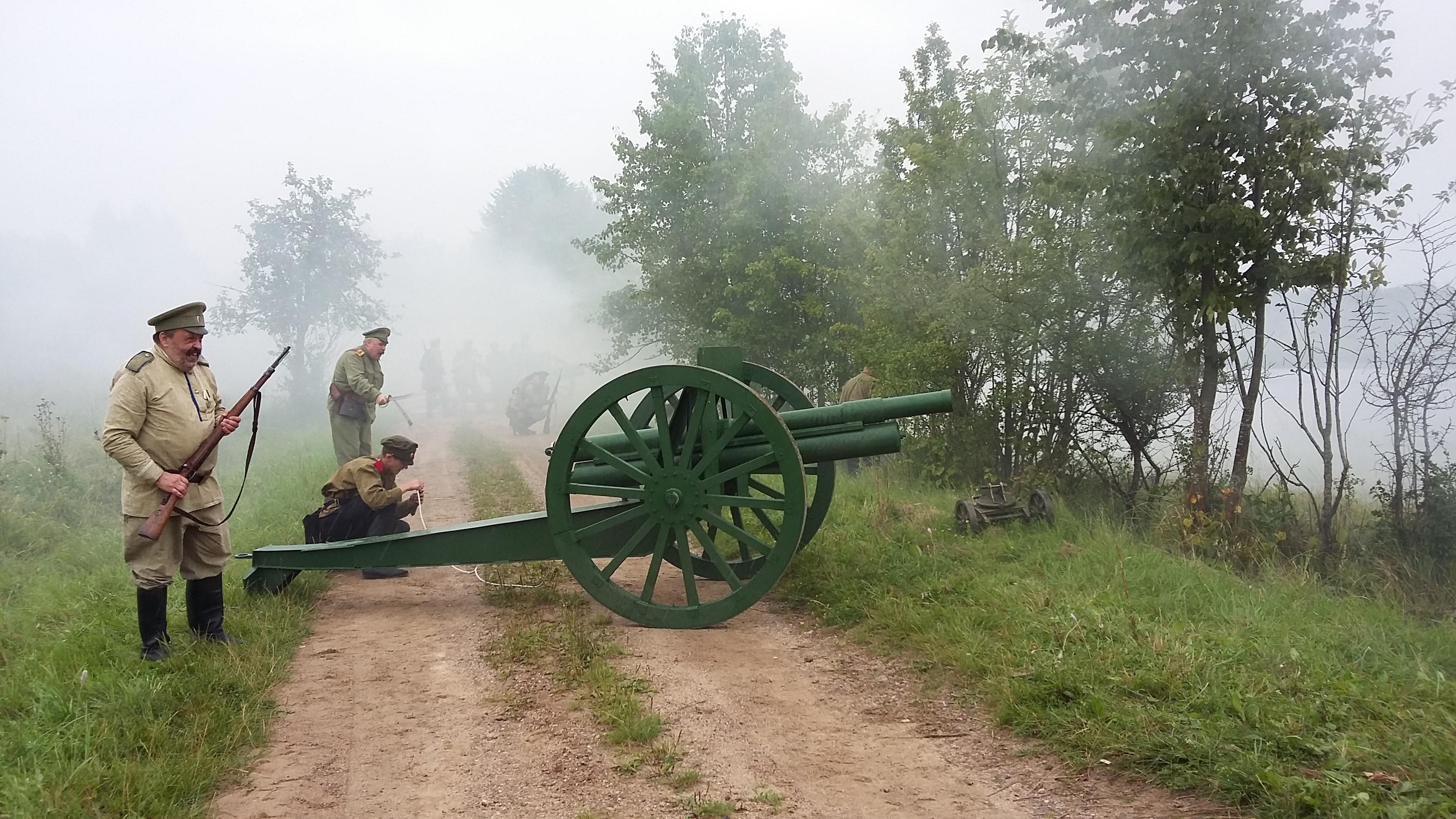 Реконструкция Гумбинненского сражения вблизи посёлка Совхозное 6 августа 2016 года